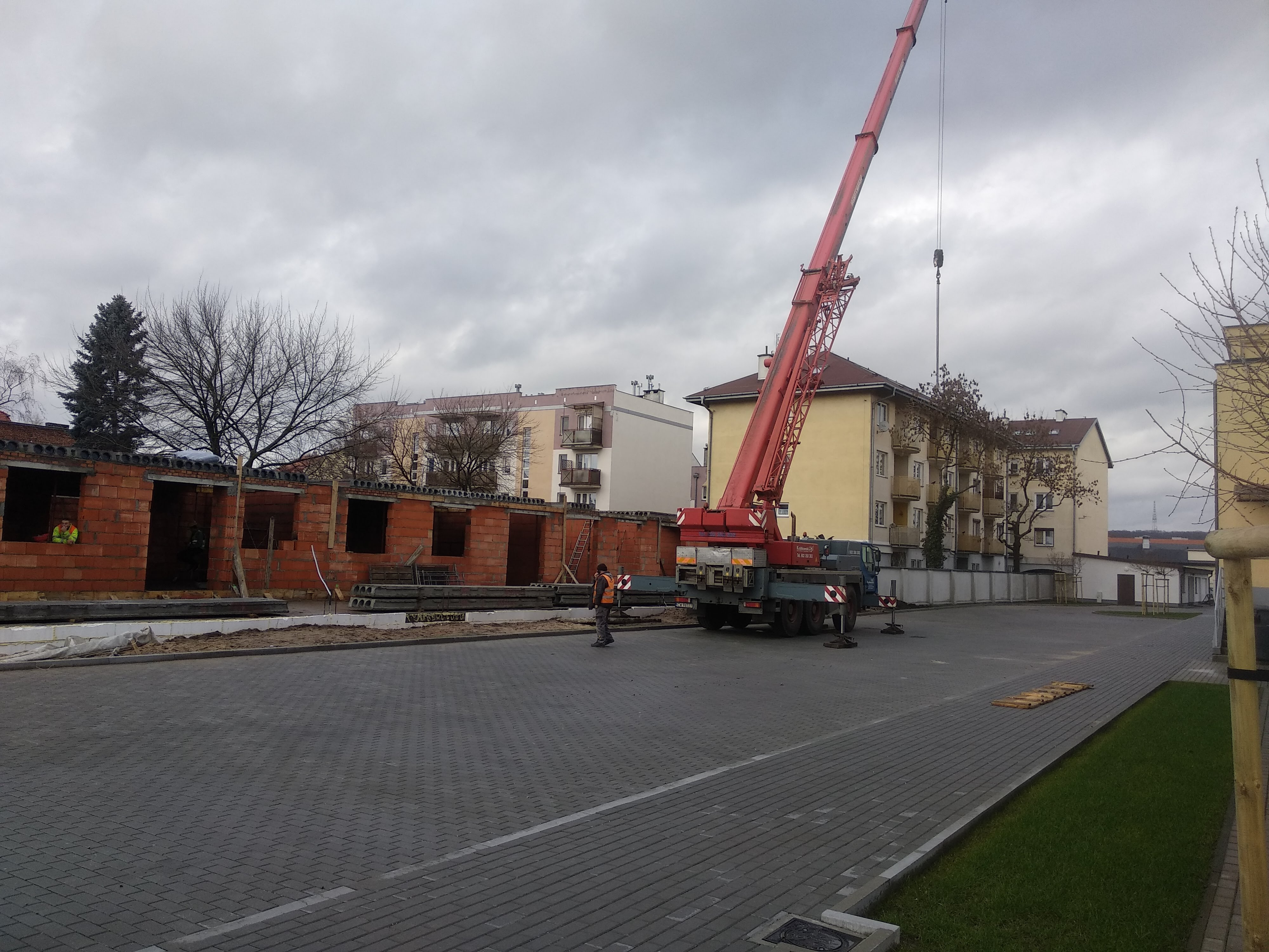 Budowa bloku przy ul. Stodólnej (2020 r.)